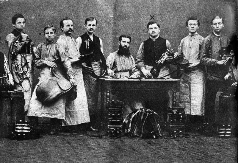 Friedrich Ebert in seiner Lehrlingszeit beim Sattler J.P. Rummel.